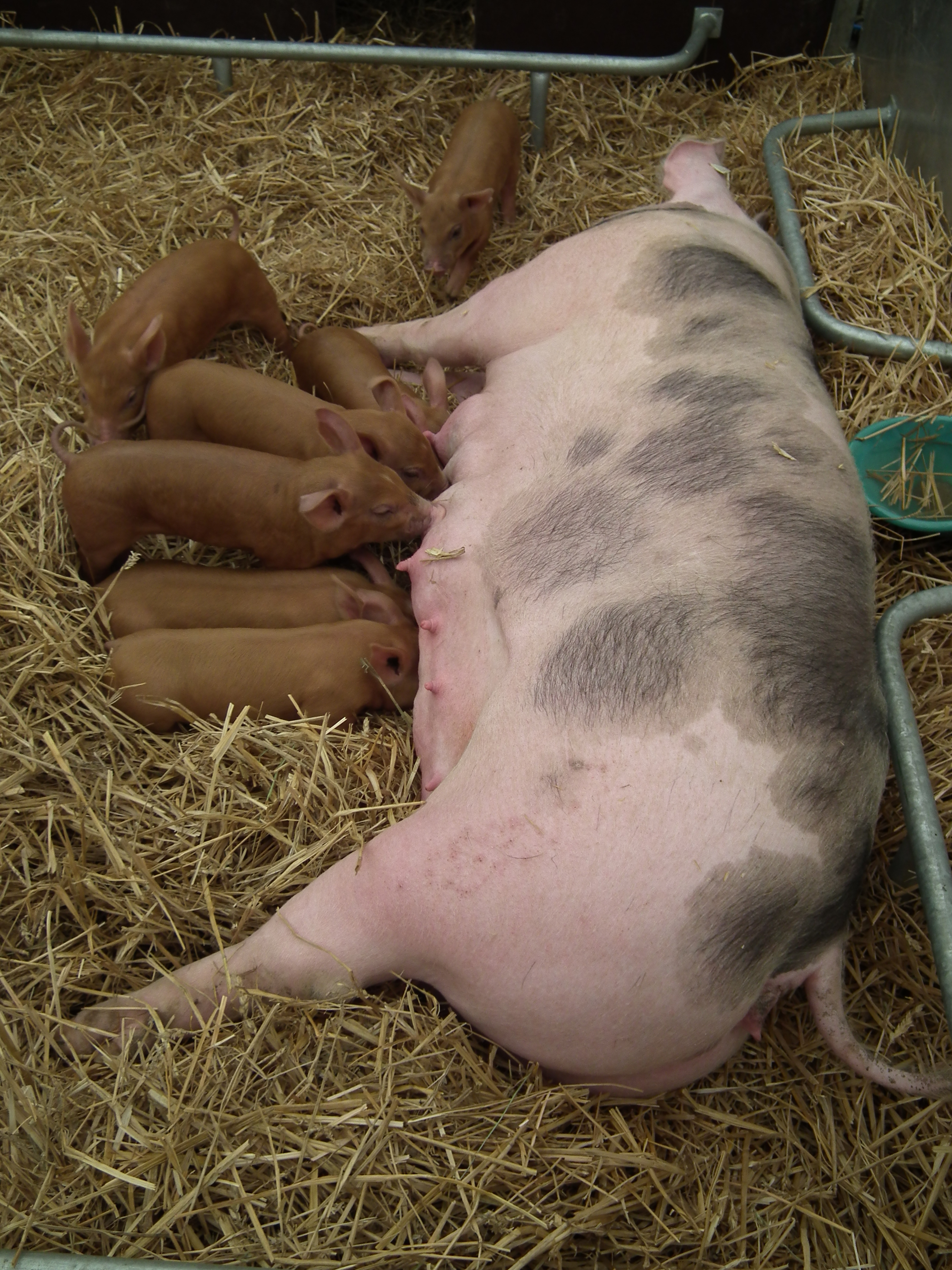 Saugende Ferkel German Piétrain